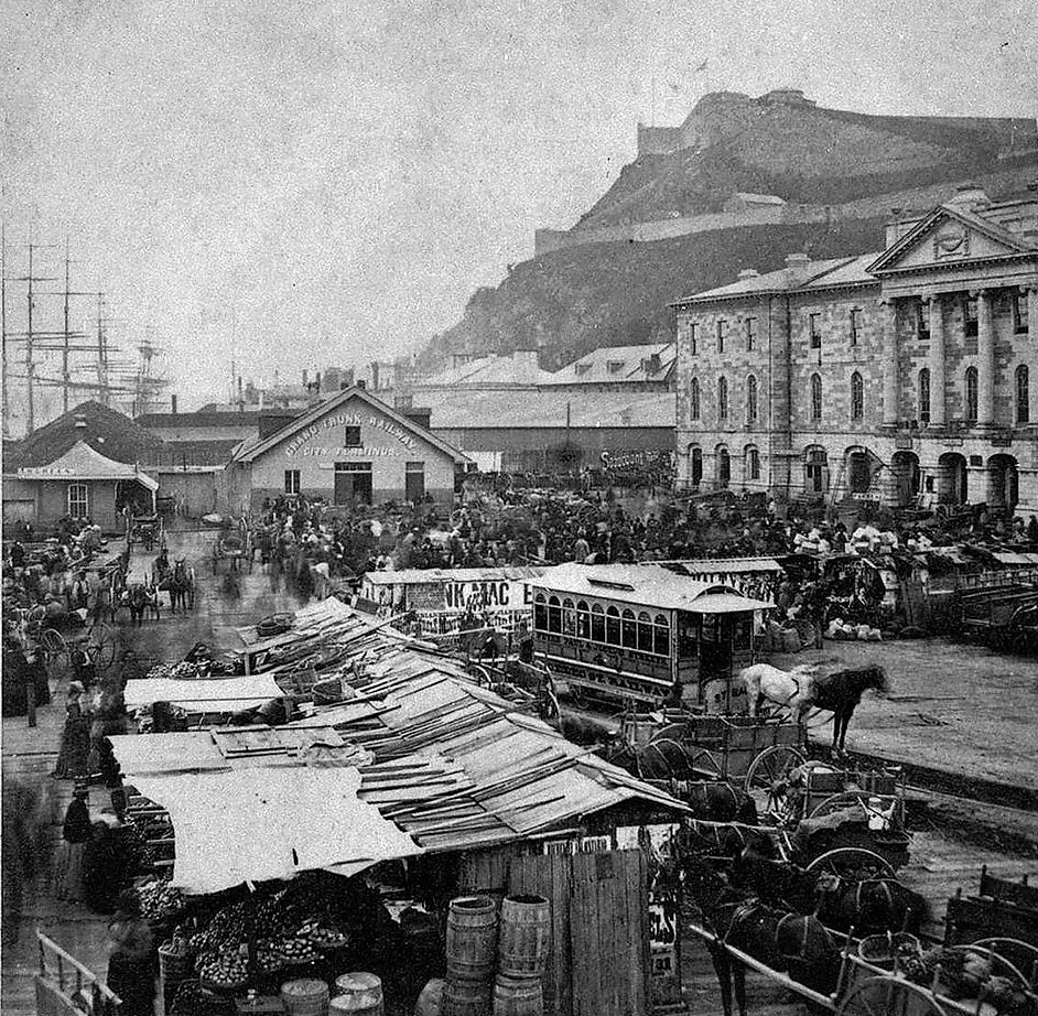 Le tramway hippomobile au marché Champlain, à Québec, en 1865